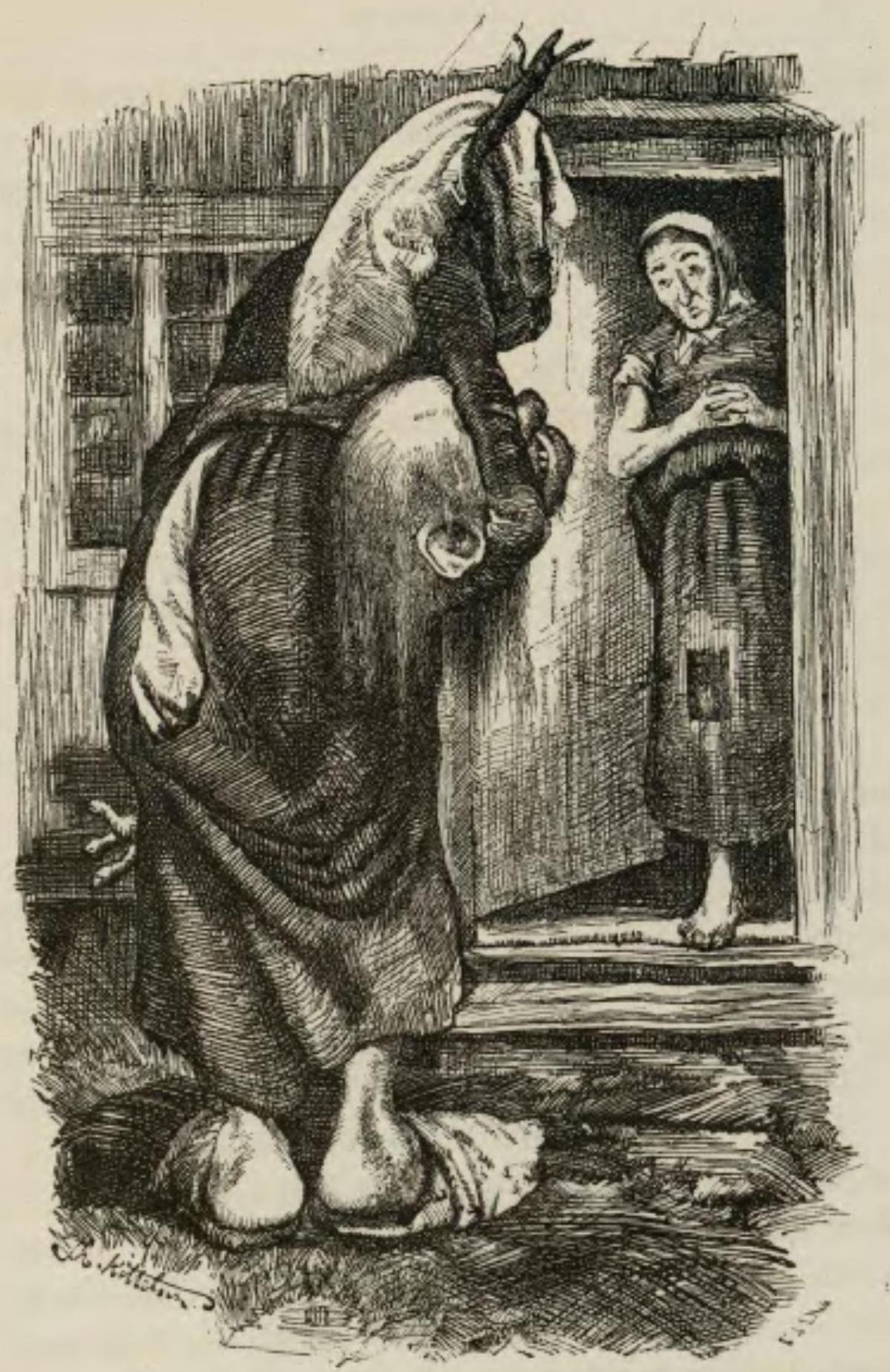 Sagobok för barn